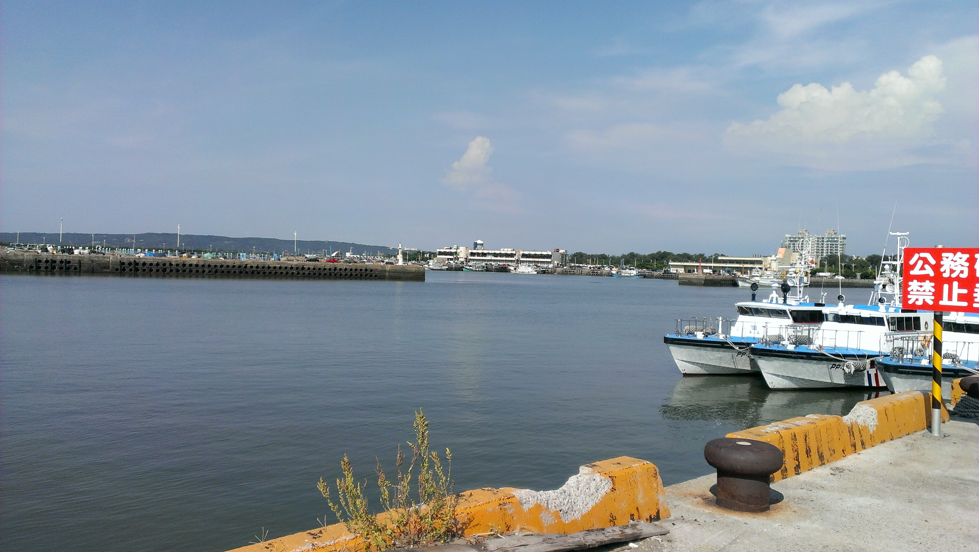 中文（台灣）: 新竹漁港港內景象